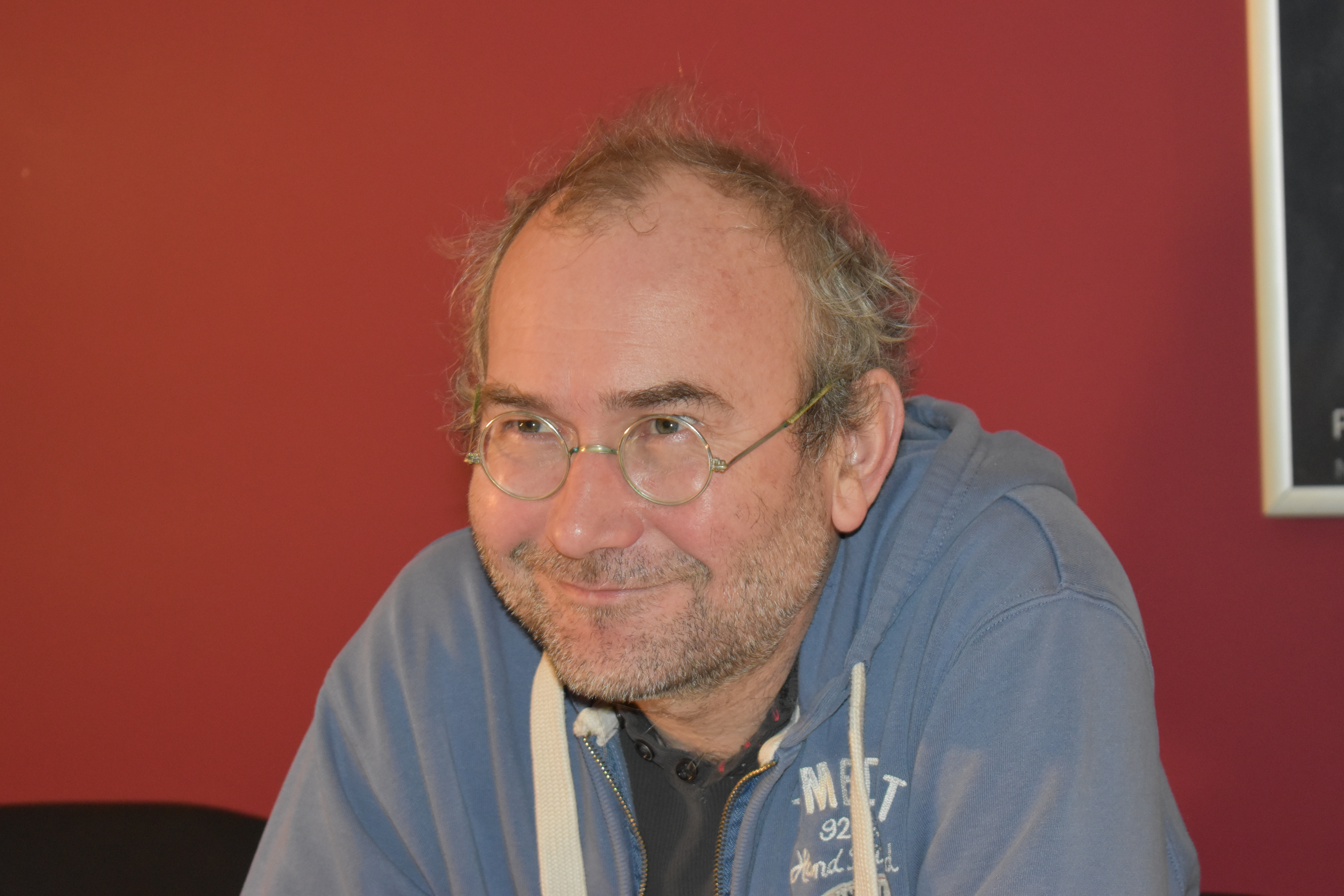 Fotka z novinářské konference 21.2.2017. Autor: Blanka Borová (Karolína Černá) pro Kritiky.cz